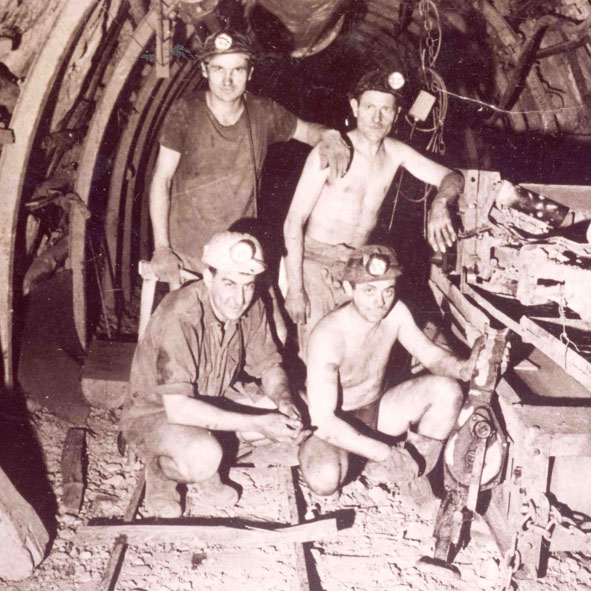 Mineurs au fond